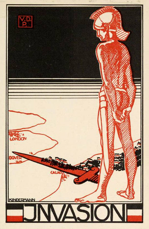 Nach einem Wettbewerb „zur Erlangung zweier Kriegspostkarten“ durch den Verein der Plakatfreunde preisgekrönter Entwurf für „Invasion“ von Georg Kindermann ...